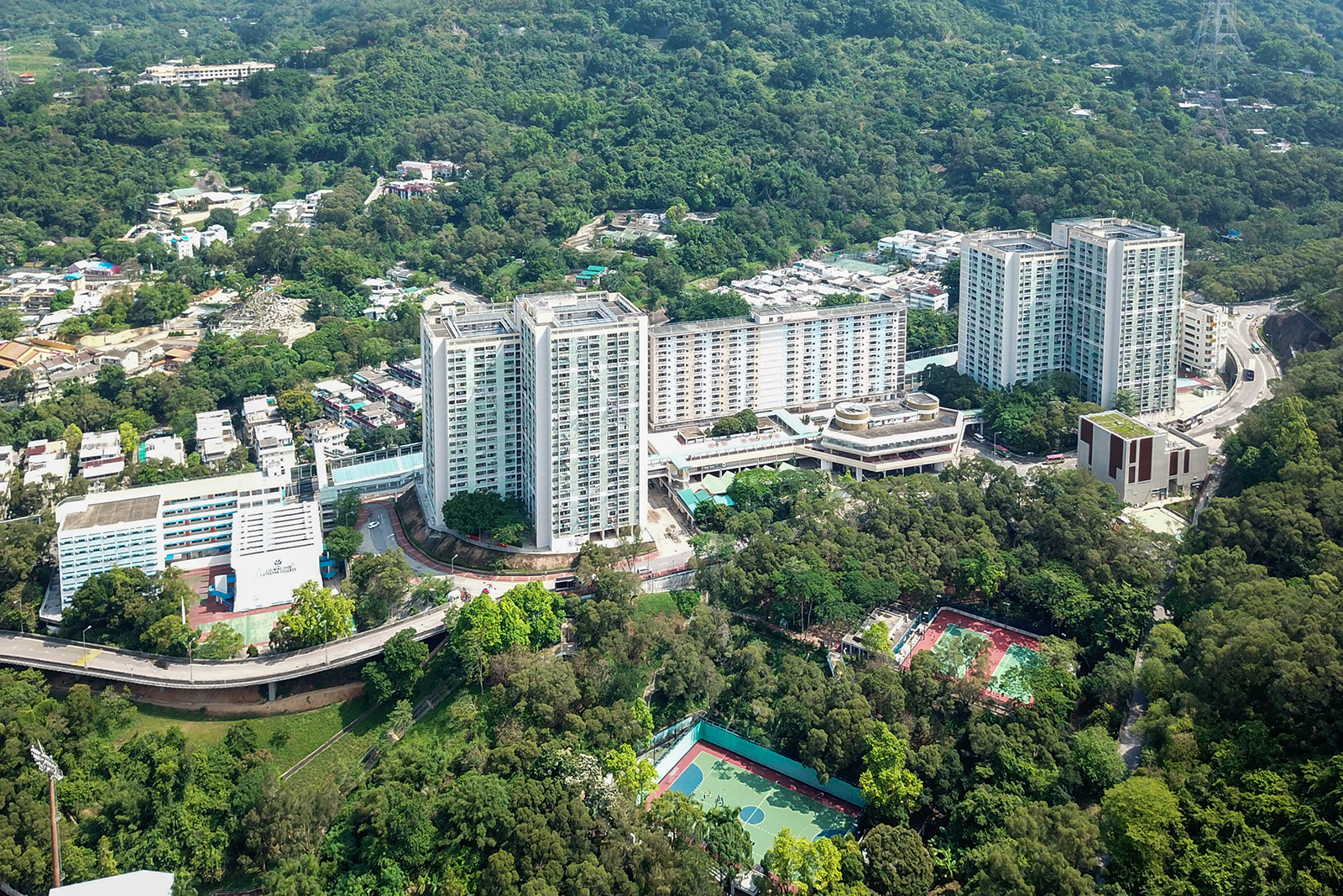 Cheung Shan Estate